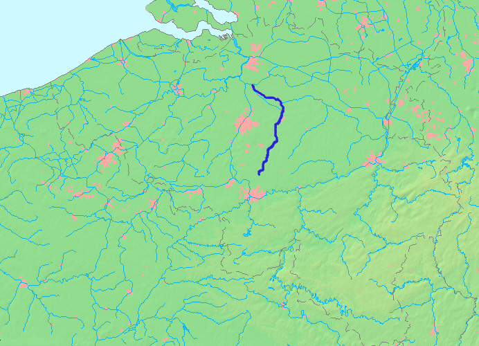 Kaart van de Dijle op basis van Wikimedia Commons kaart MapBelgiumWater